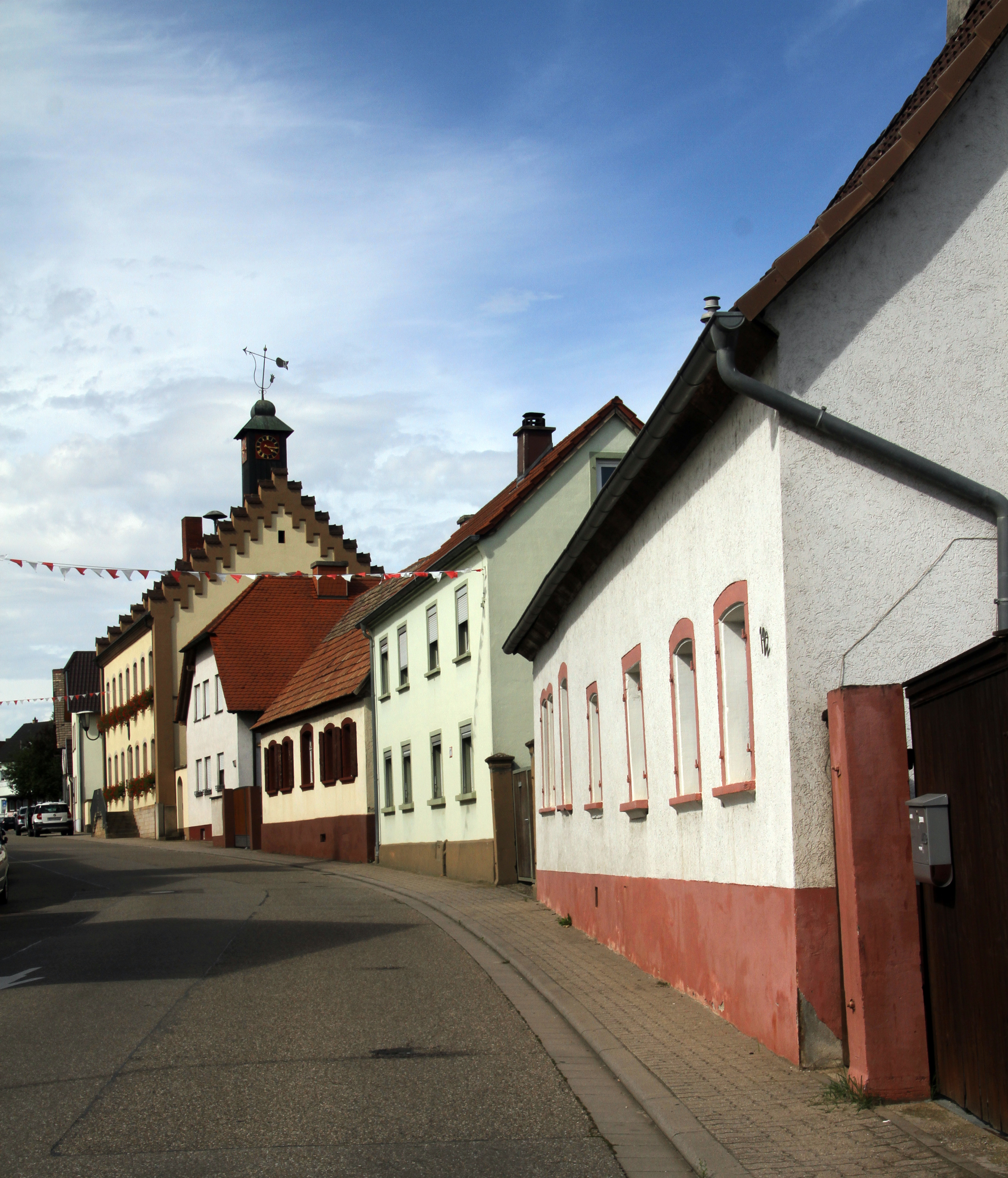 Hördt,Schulzentraße.